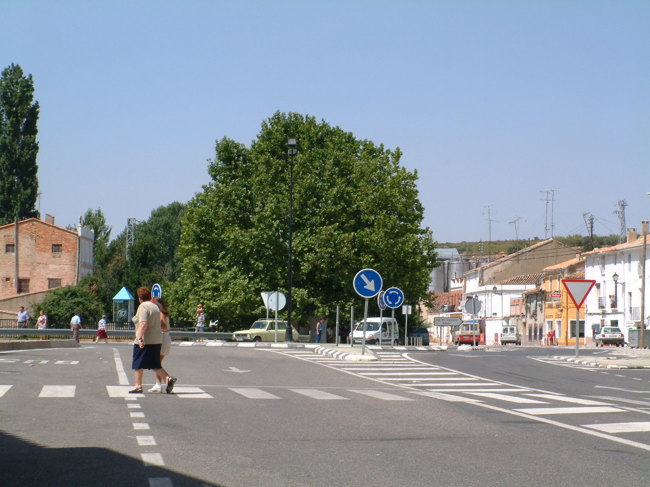 N-III en Caudete de las Fuentes (Valencia, España)